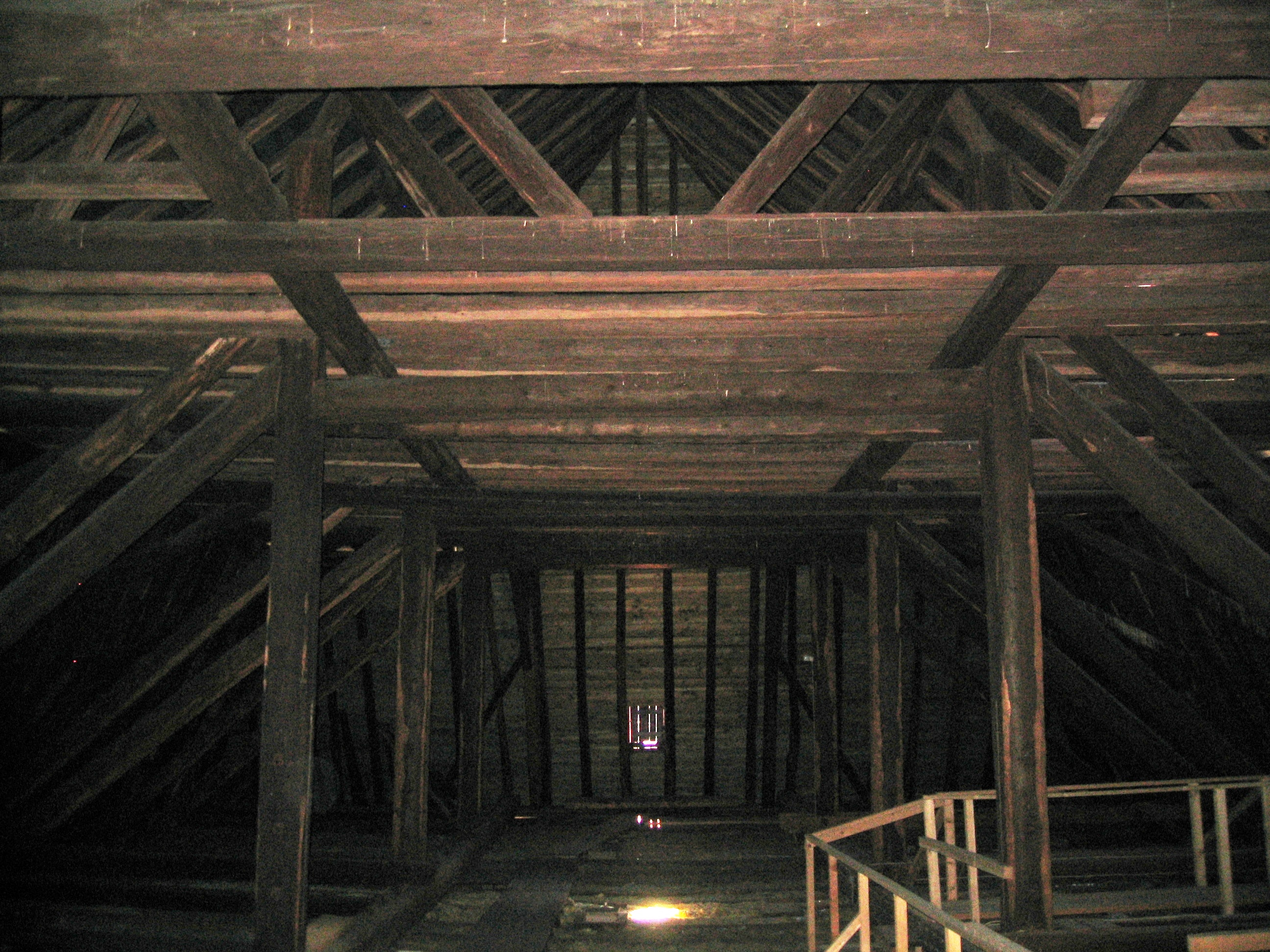 Dachgebälk der Evangelisch-reformierten Kirche in Wölfersheim. Mit freundlicher Genehmigung der Kirchengemeinde.